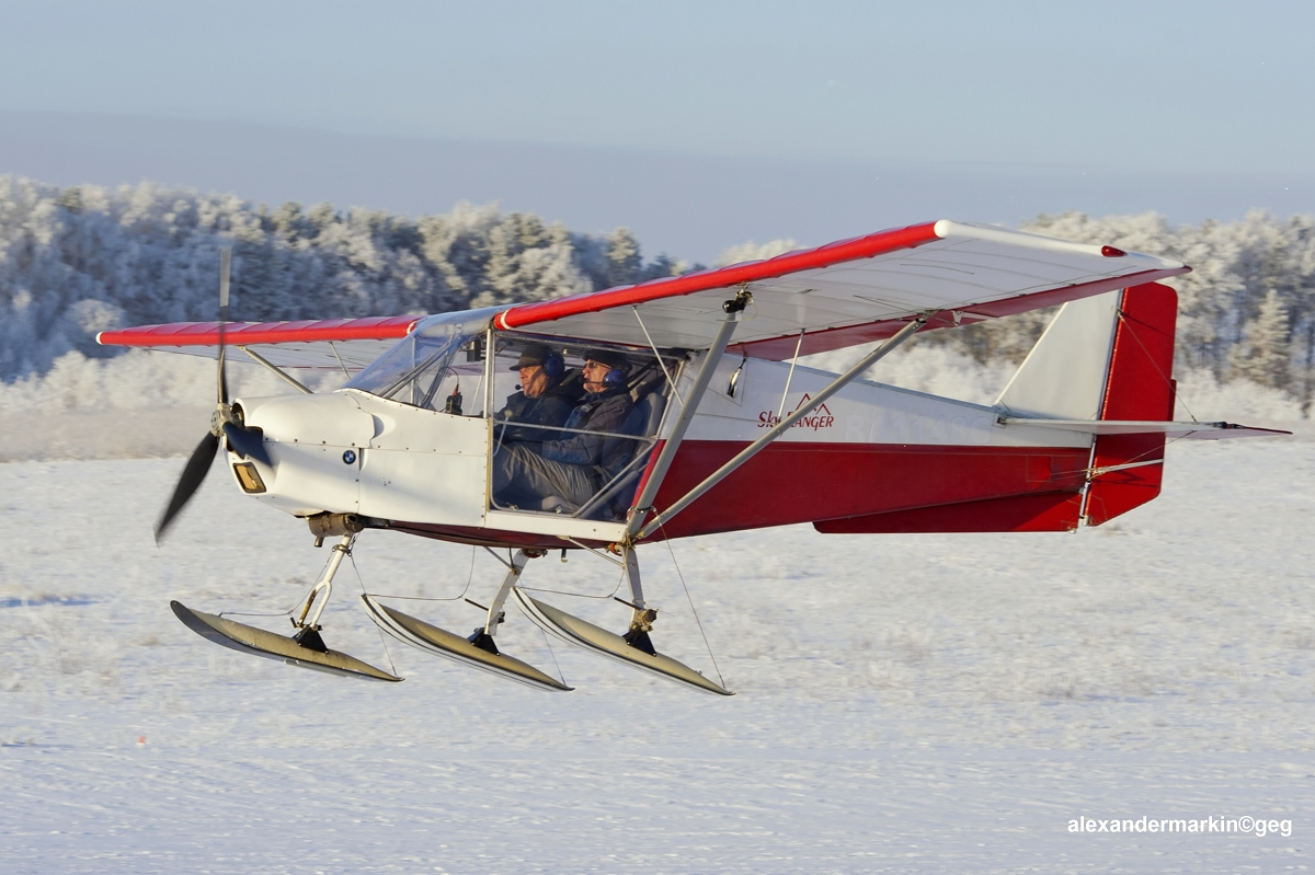 Flight. "Sky Ranger"